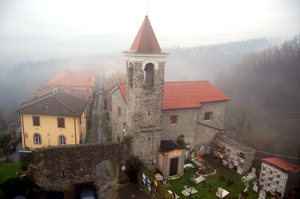 Lusuolo (municipality of Mulazzo, province of Massa-Carrara, Tuscany